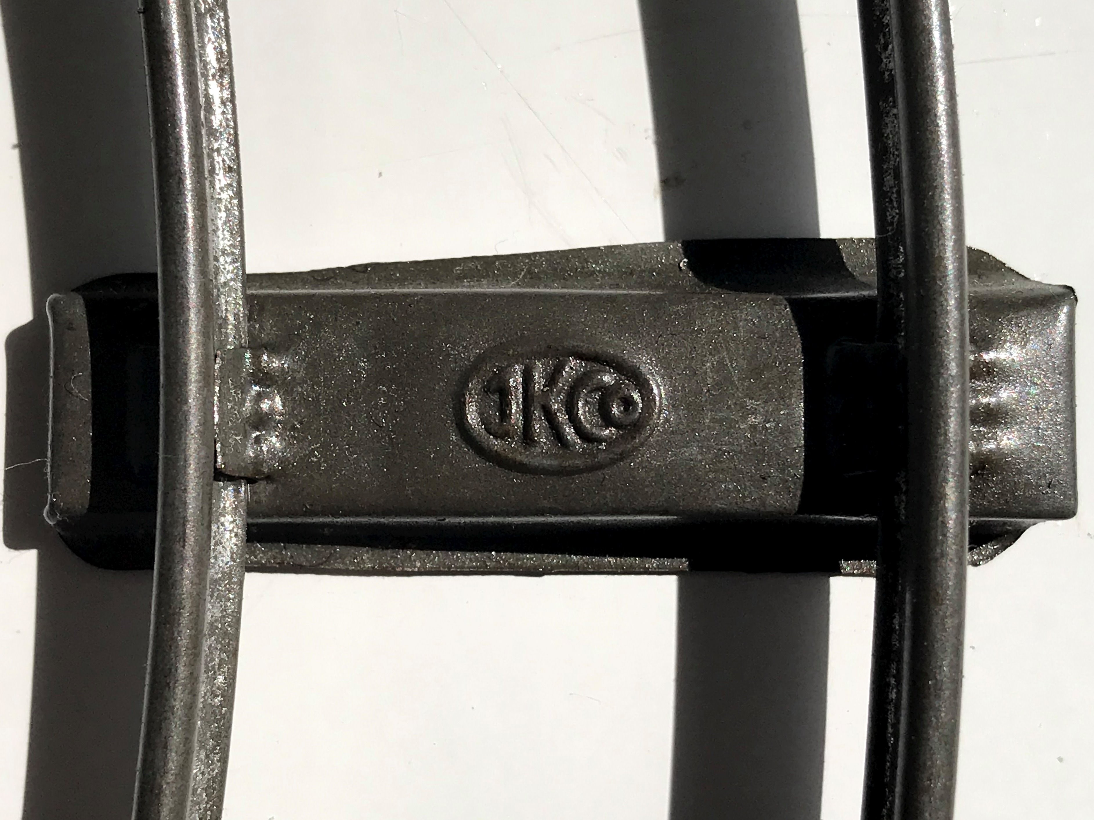 weiteres Logo der Fa. Kraus Fandor